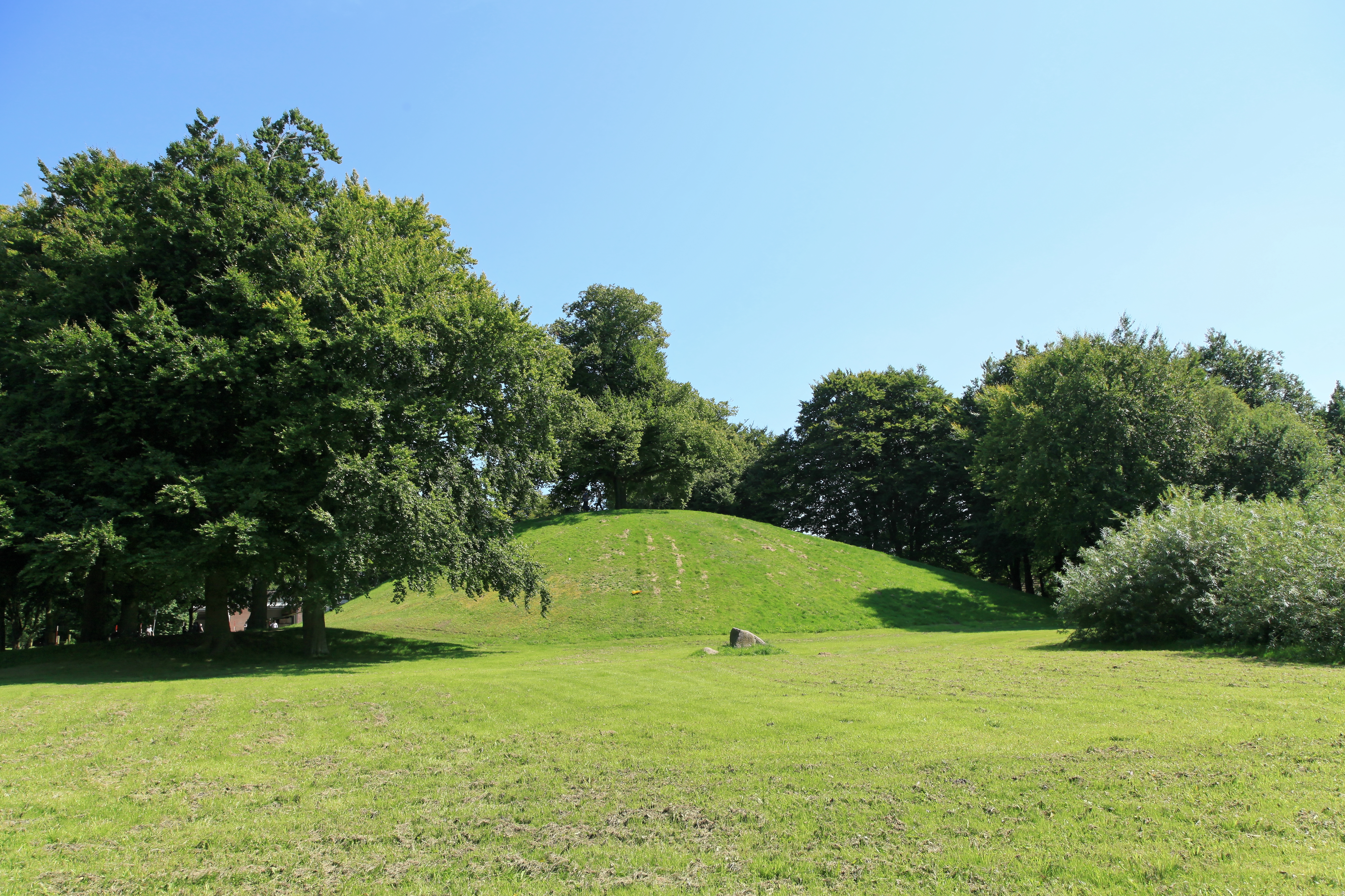 Plytenberg, Plytenbergstraße in Leer (Ostfriesland)